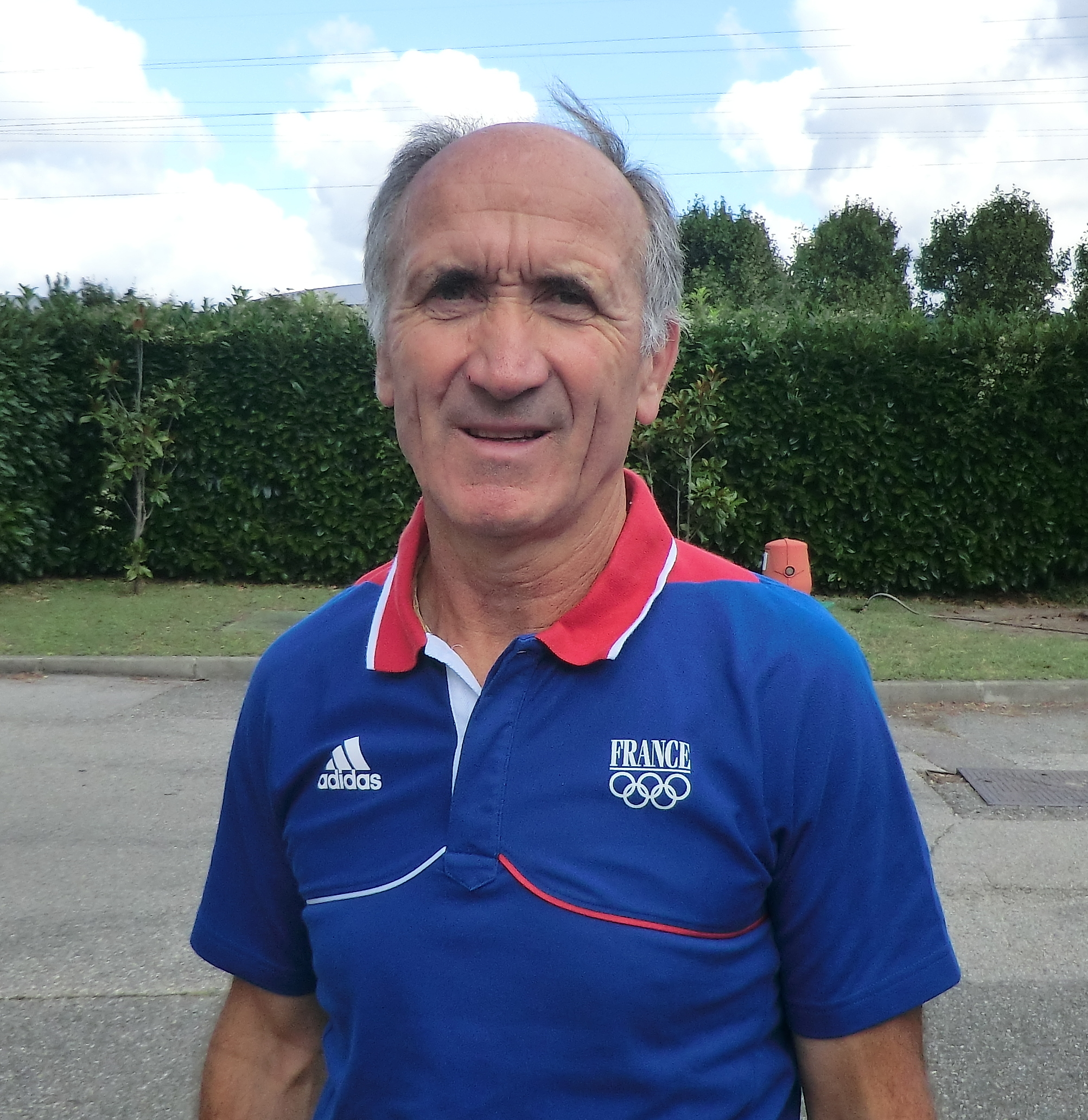 Coureur/directeur sportif au départ de l'hôtel : étape 1 du Tour de l'Ain 2013.